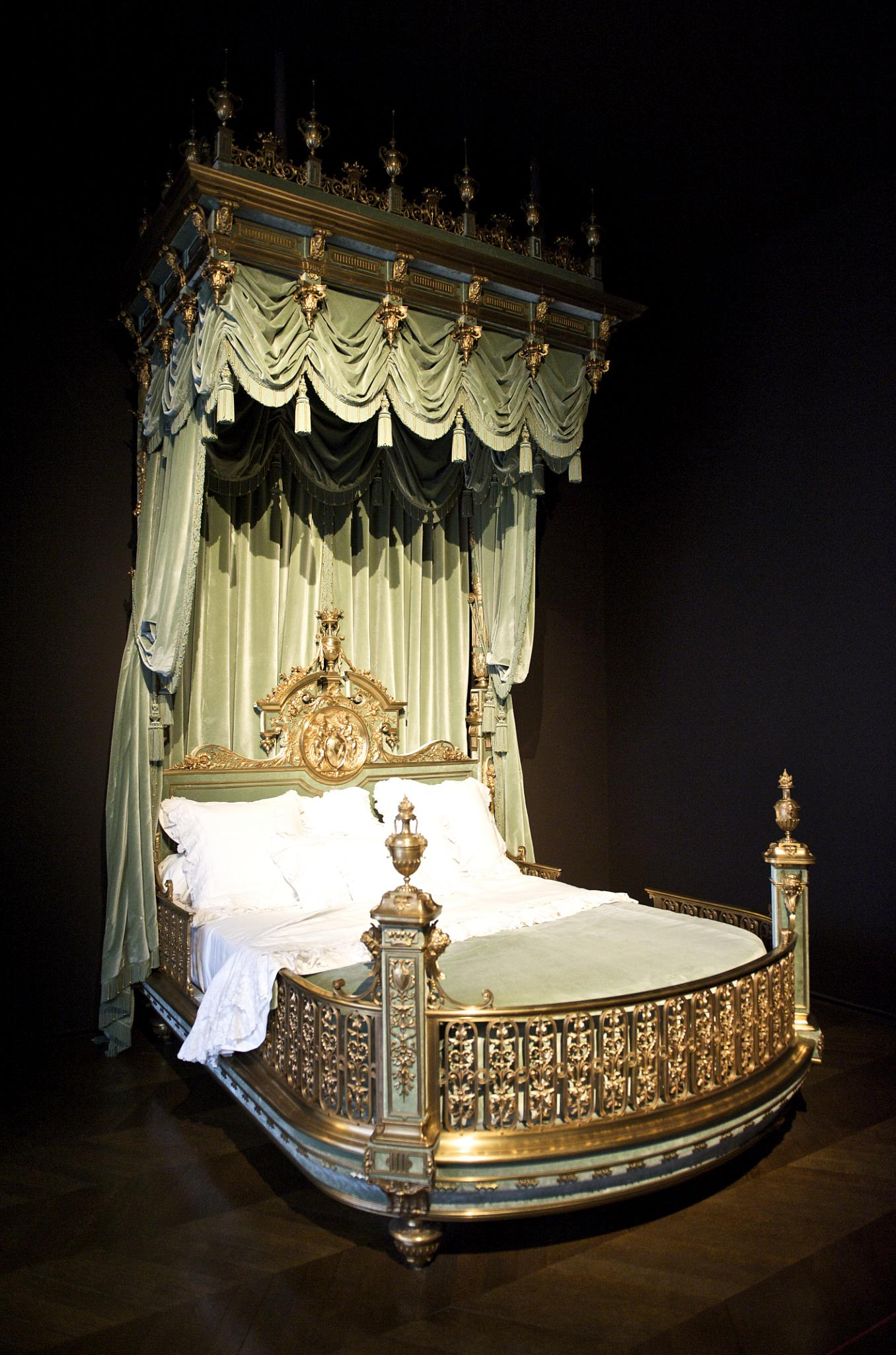 Édouard Lièvre (Français, 1829-1886): Lit de parade de Valtesse de la Bigne, Paris, vers 1875, bâti en bois, bronze doré, velours de soie vert, legs Émilie Louise de la Bigne, dite Valtesse de la Bigne, 1911, Musée des arts décoratifs, Paris.[1] ↑